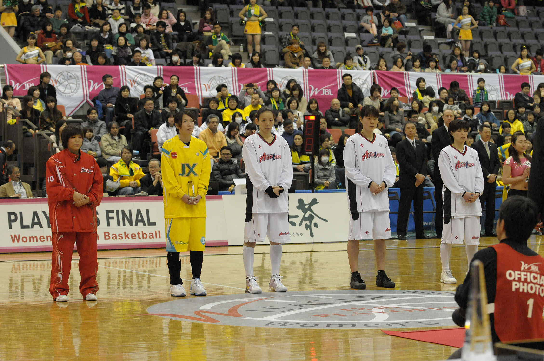 第13回Ｗリーグ アウォード表彰。船橋アリーナで。